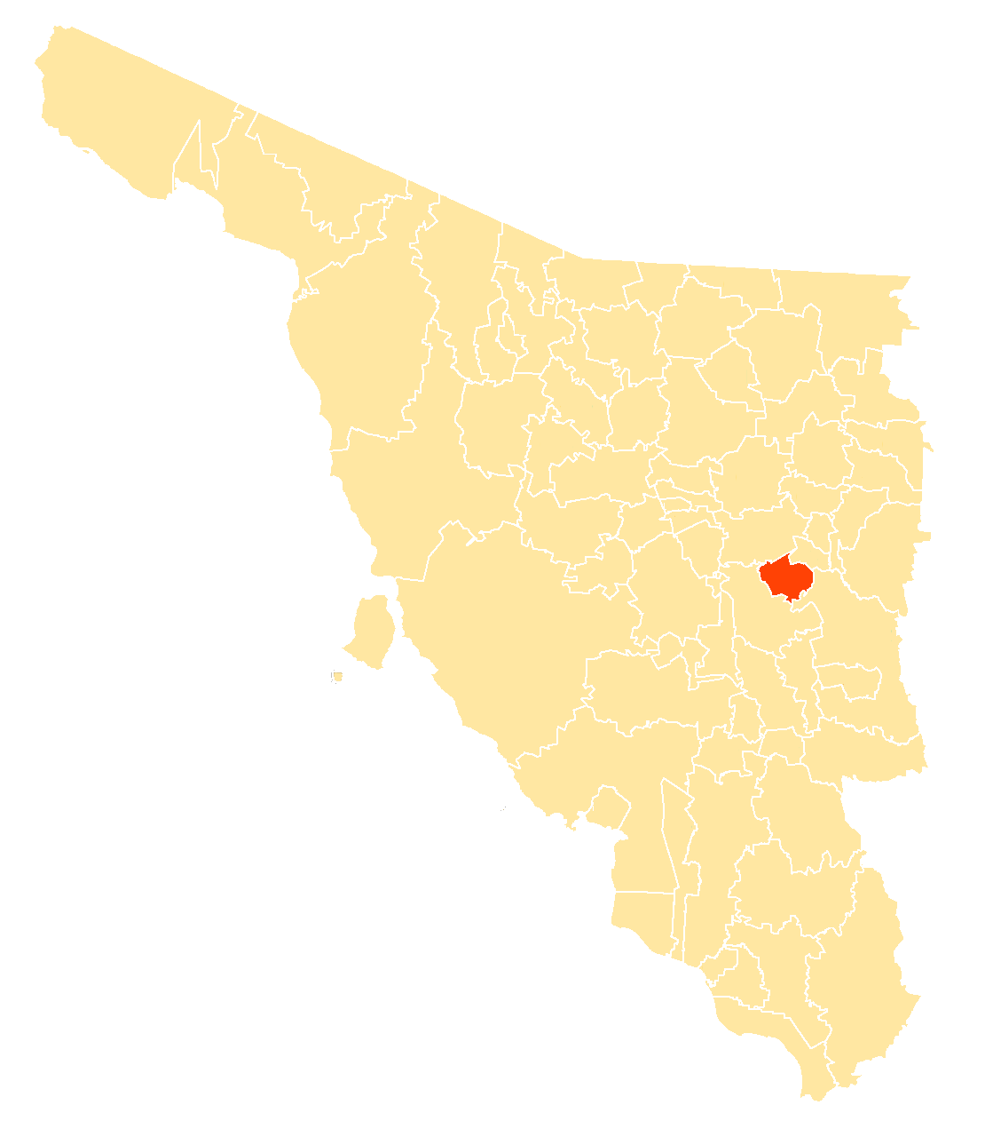 Municipio de Sonora, México.